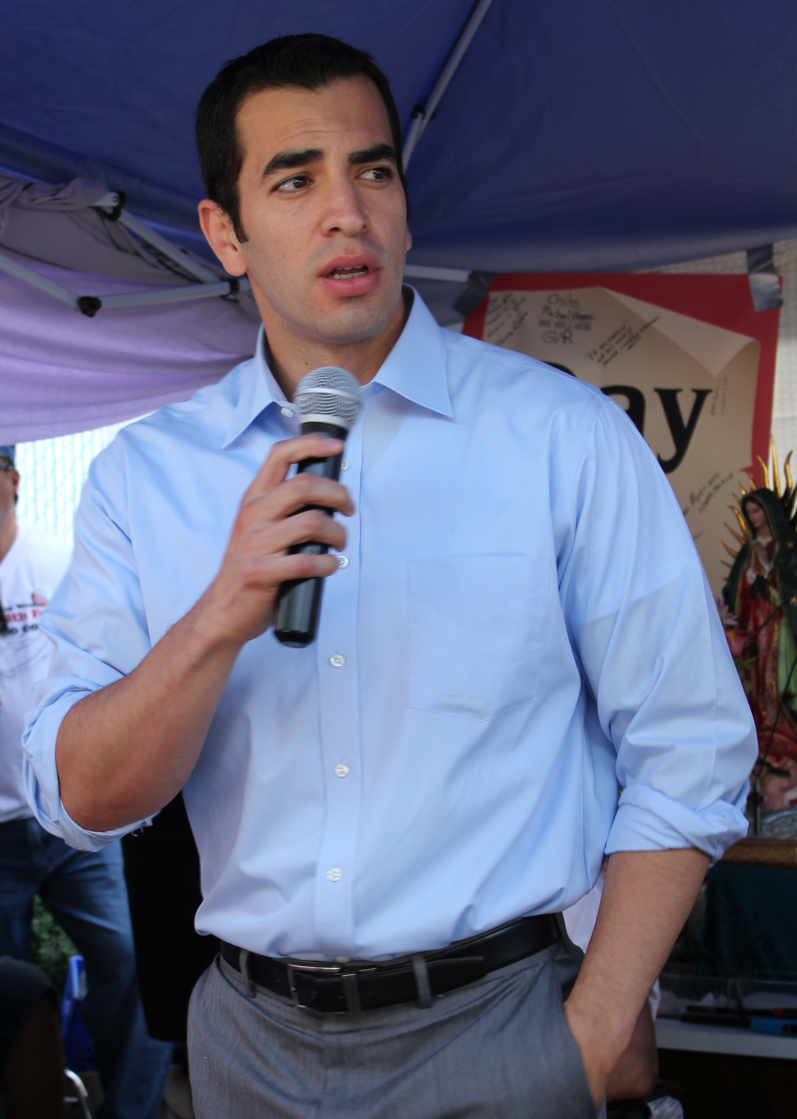 Nevada State Senator Ruben Kihuen